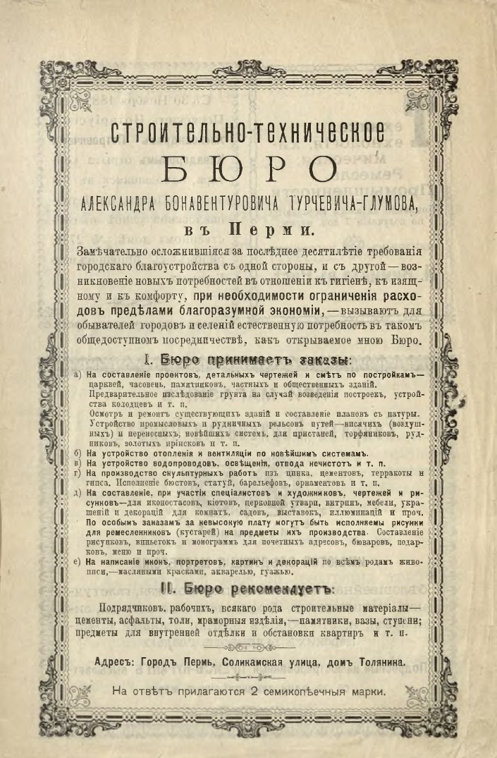 Объявление в Перми. Строительно-техническое бюро Турчевича-Глумова в 1889 г. Дом Толянина на Соликамской улице